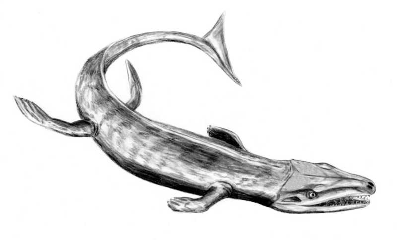 Dakosaurus maximus, pencil drawing